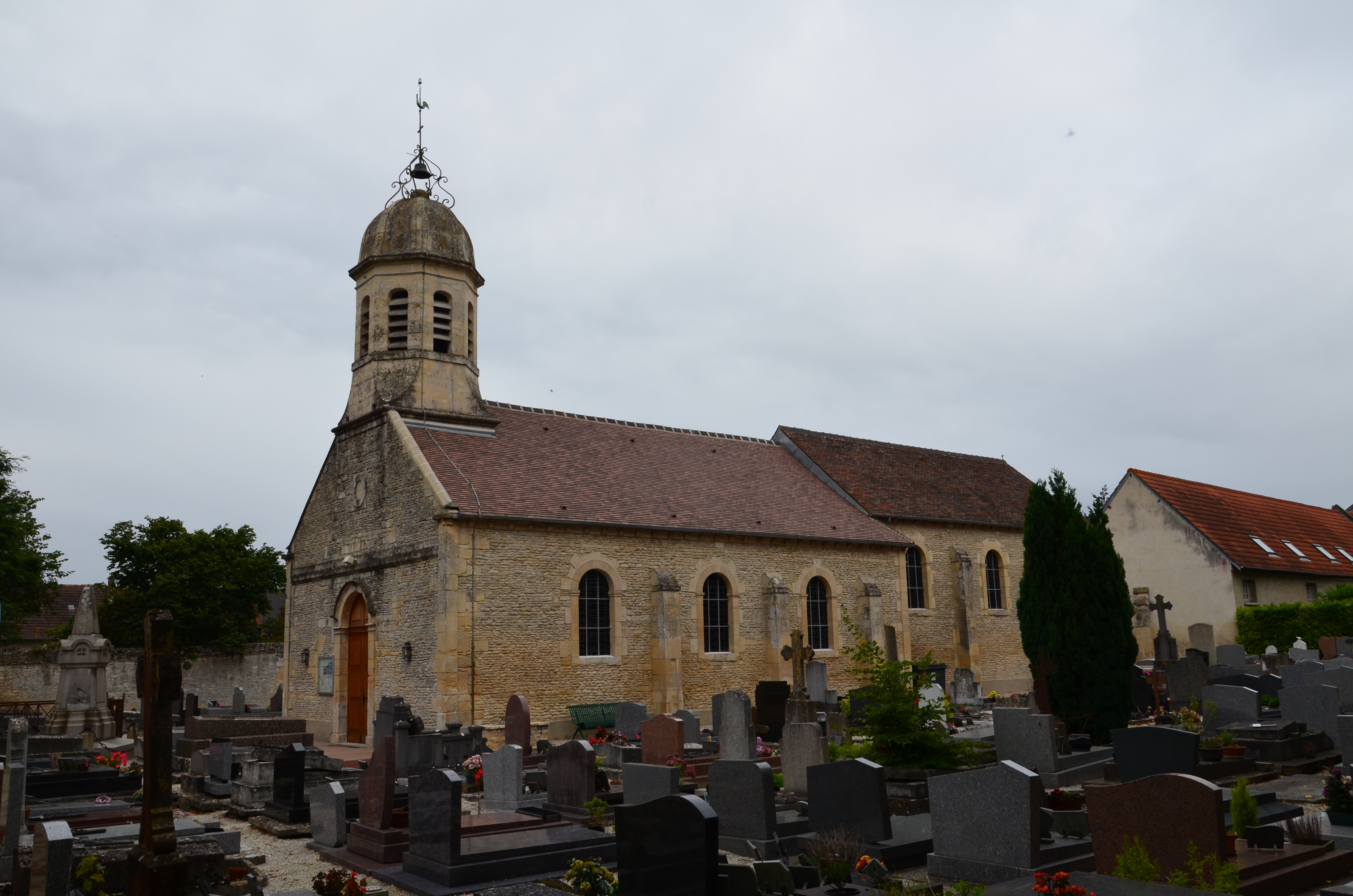 Église Saint-Martin de Cormelles-le-Royal.